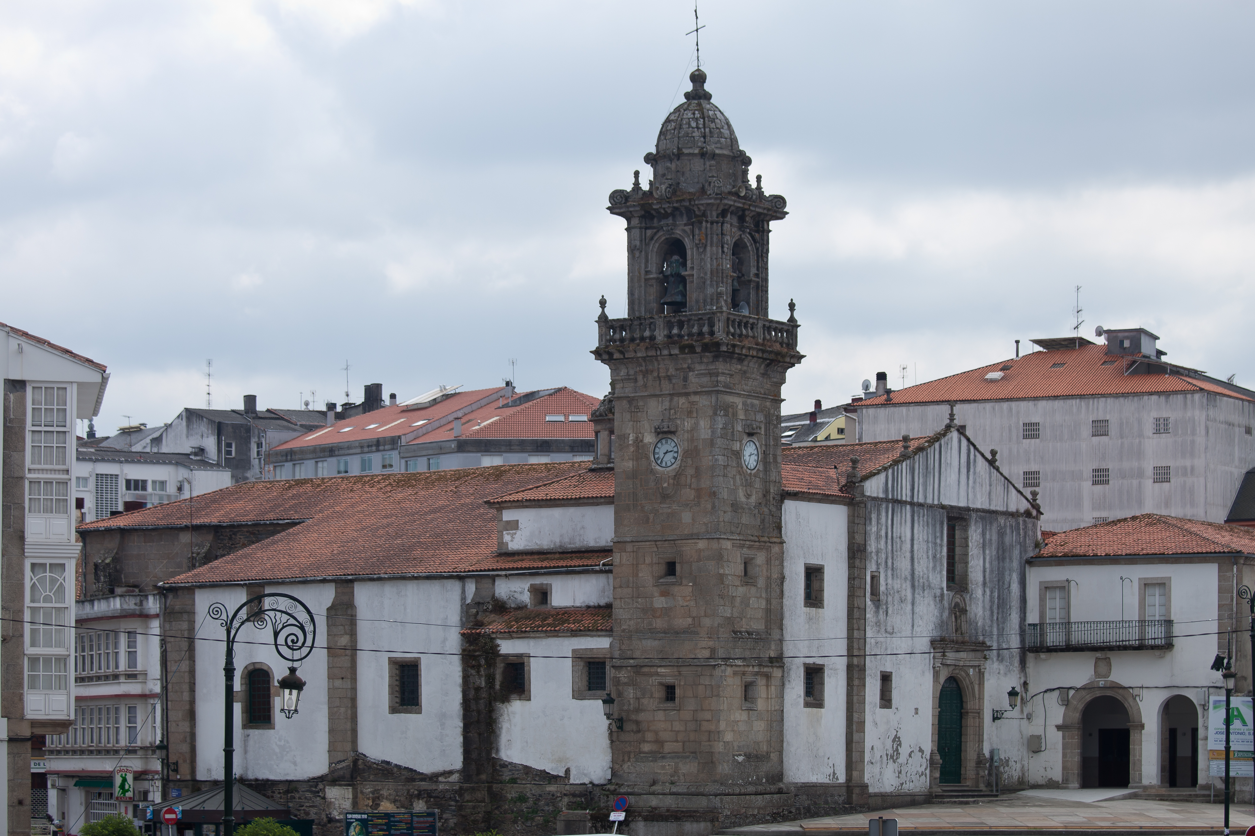 Igrexa de San Domingo de Betanzos